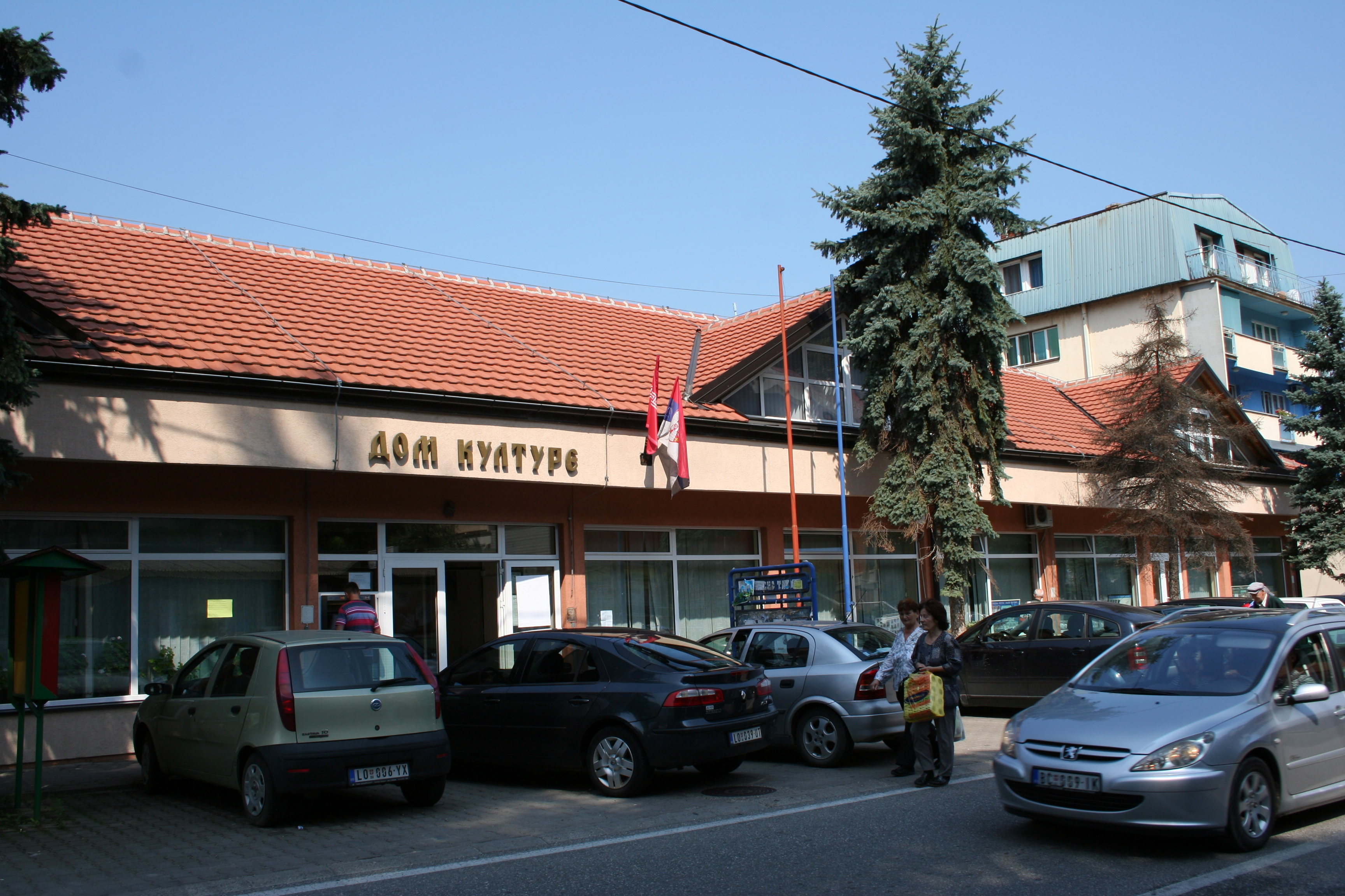 Dom kulture, Mali Zvornik